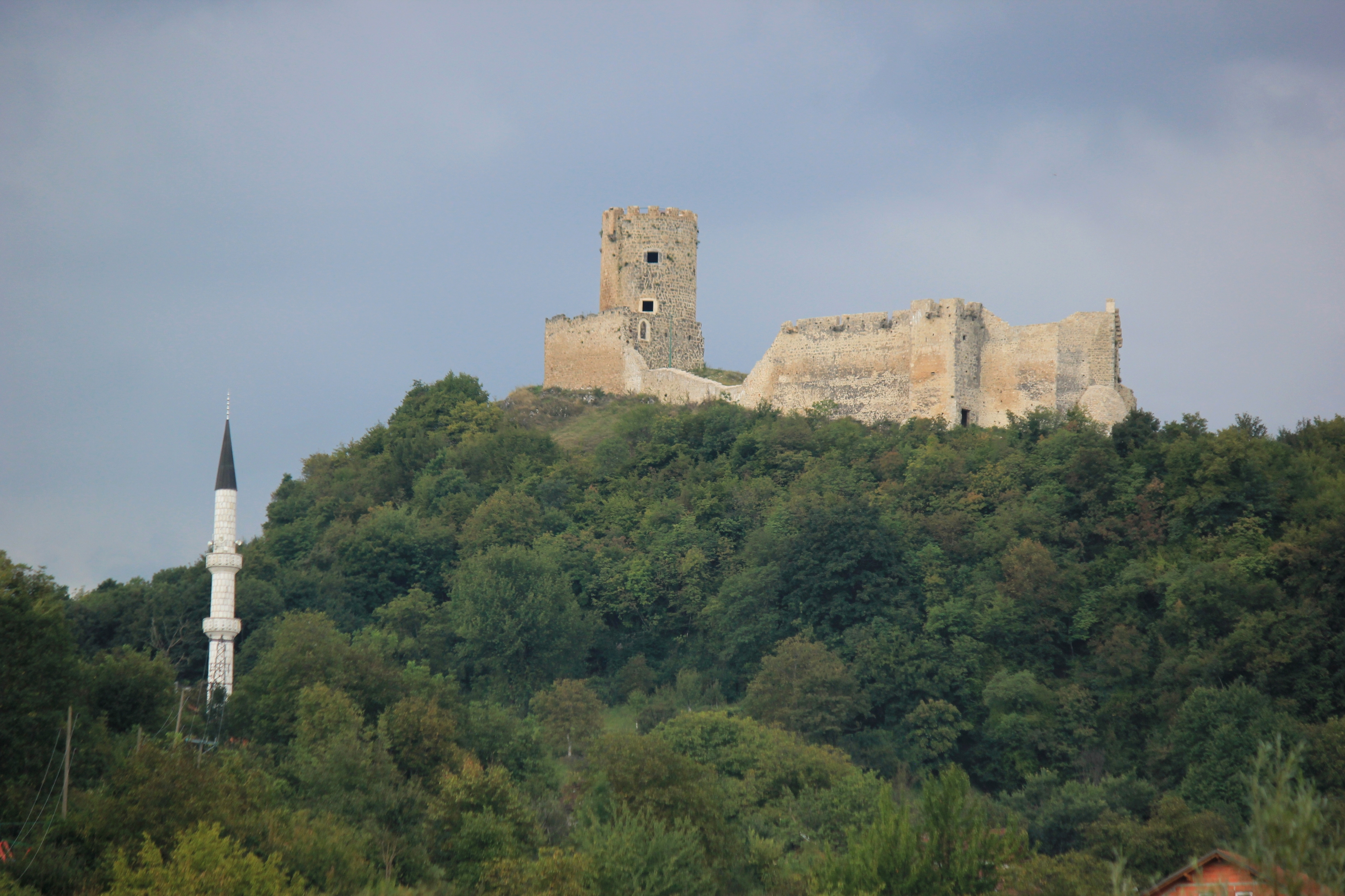 Burgruine "Sokolačka kula" bei Sokolac, Bihać, Bosnien.